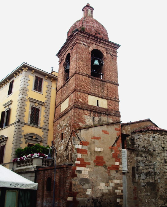 Campanile e area absidale della Chiesa di San Pietro a Grosseto, Tuscany (Italy)